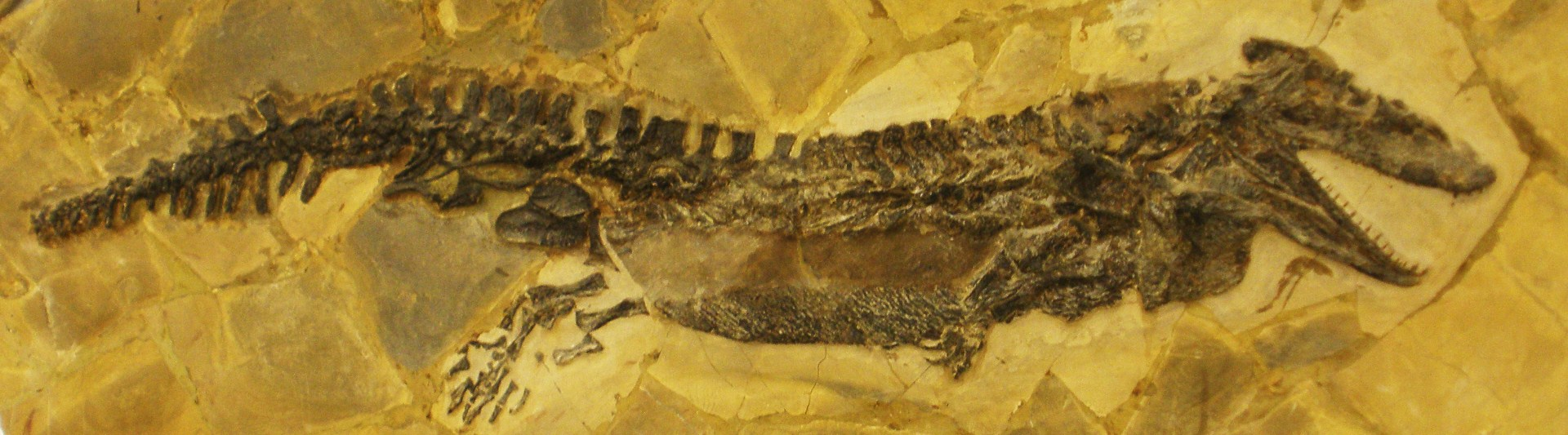 Fossil of Chelyderpeton, an extinct amphibian